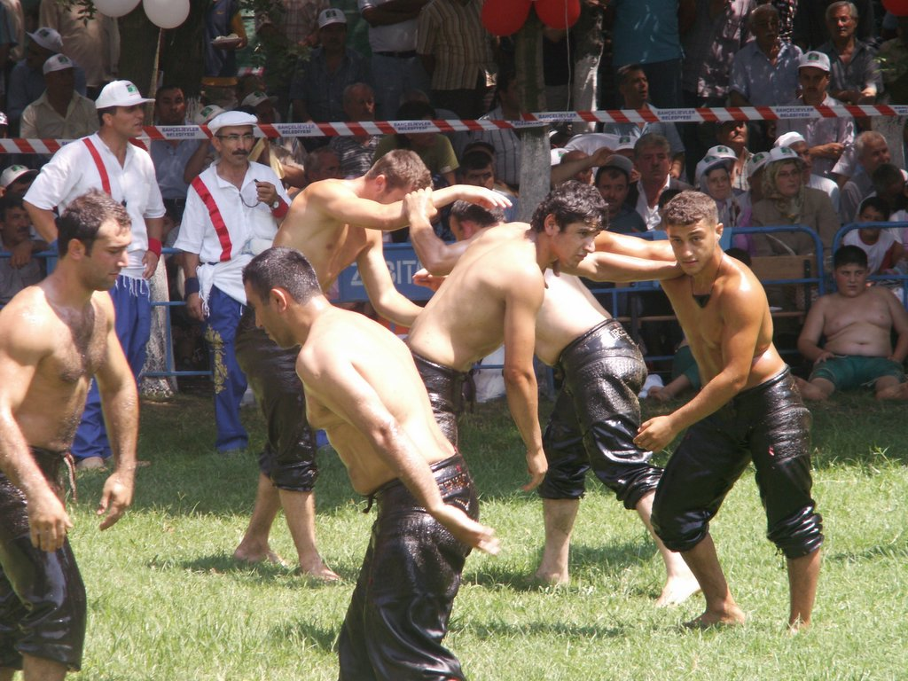 Yağlı güreş tournament in Istanbul on 6th August 2006